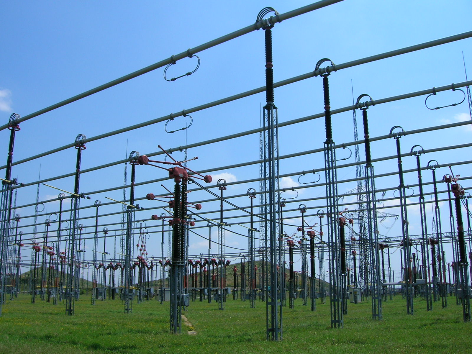 Umspannwerk Wien-Südost der Austrian Power Grid AG. (Sammelschienen und Trenner im Vordergrund)